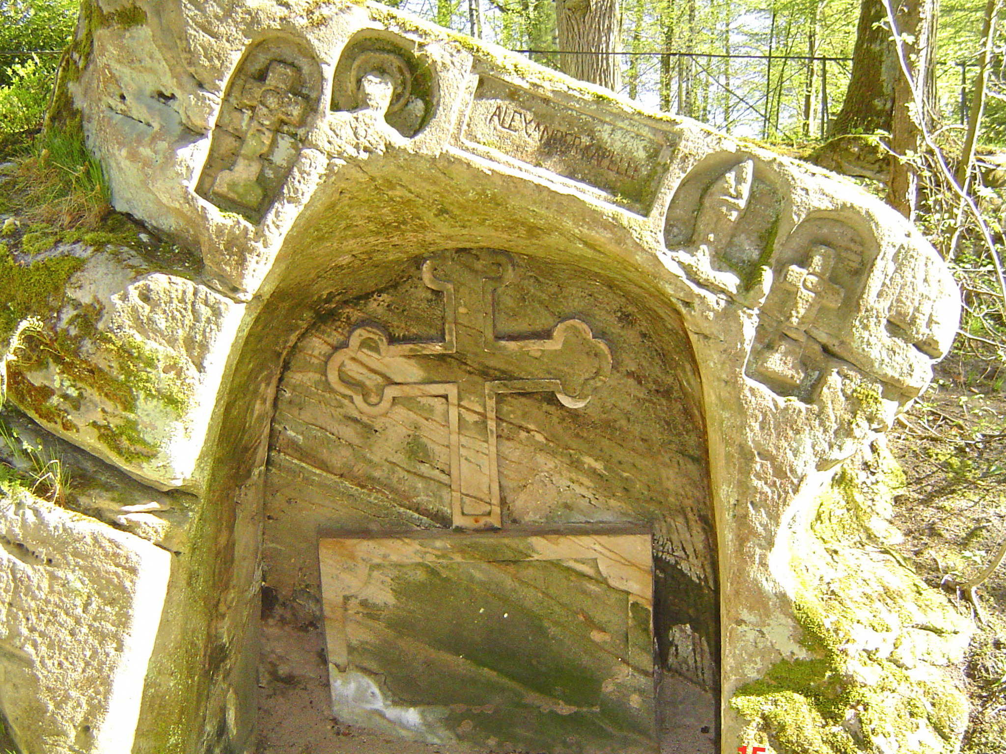 Donndorf - Fantaisie Schlosspark - Alexanderkapelle